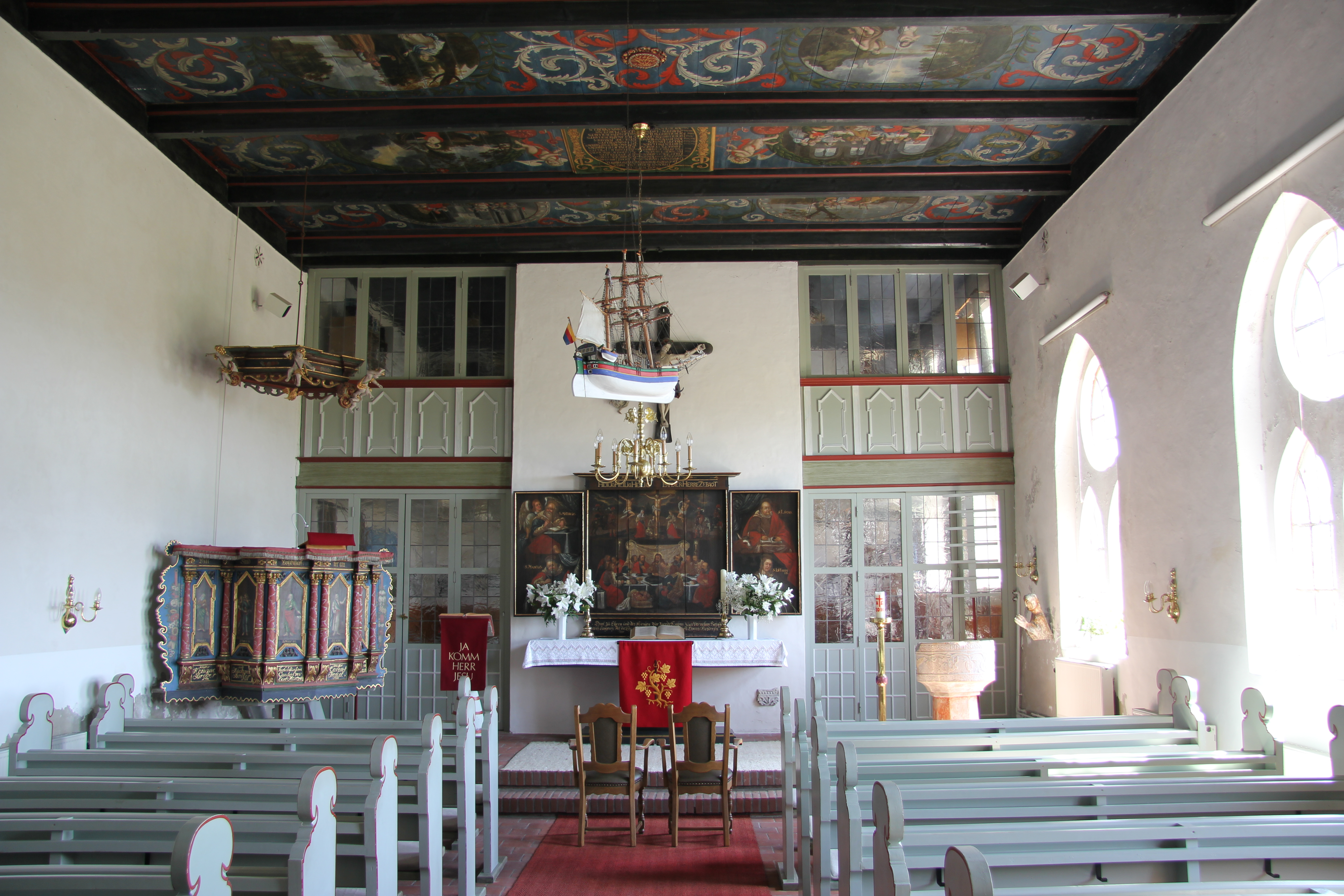 Innenansicht der Kirche auf Hallig Langeneß